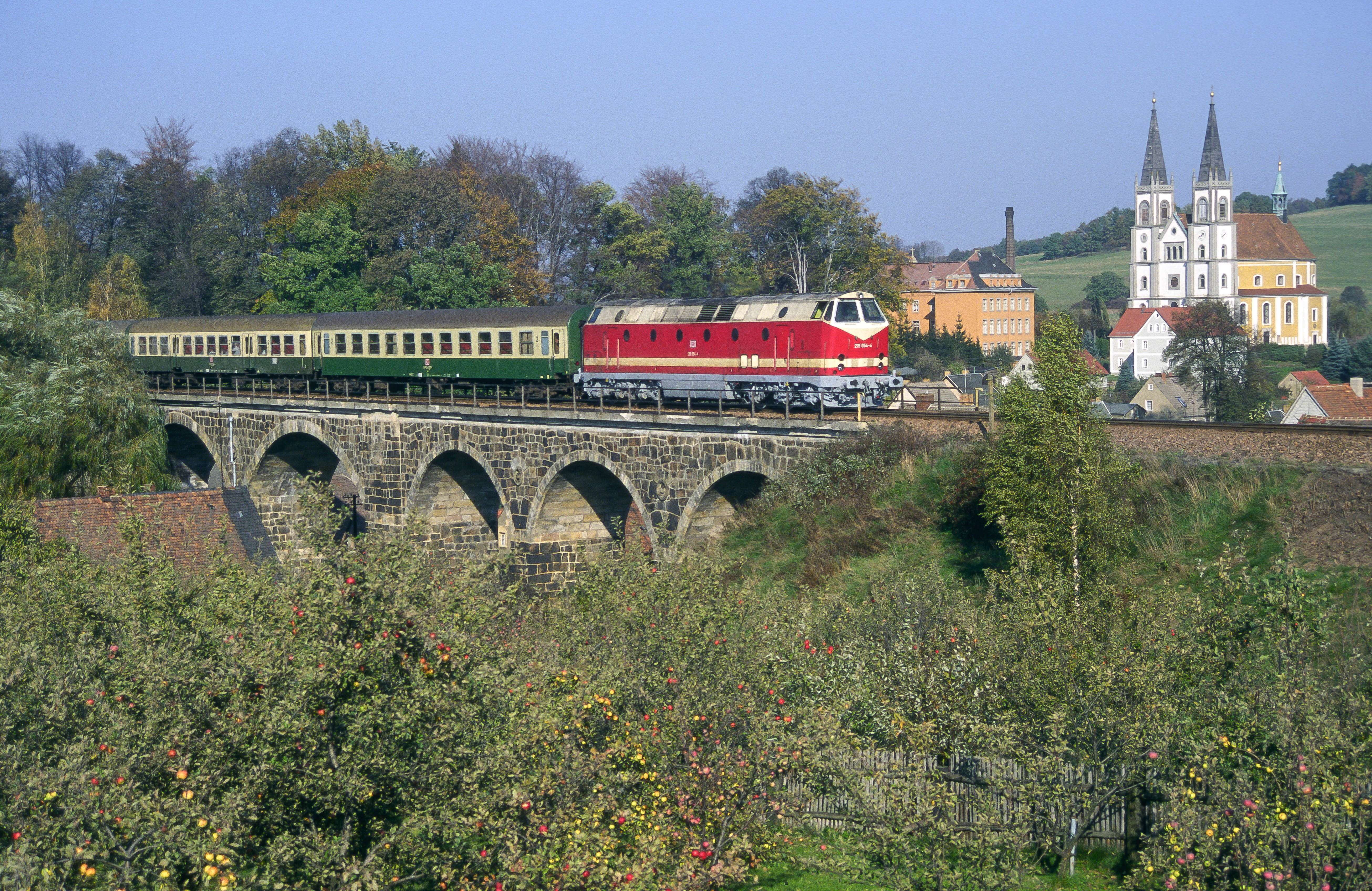 Baureihe 219 (ex DR-Baureihe 119) in Schirgiswalde-Kirschau